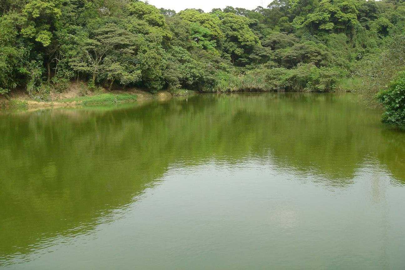 臺北縣中和市胖葫蘆池